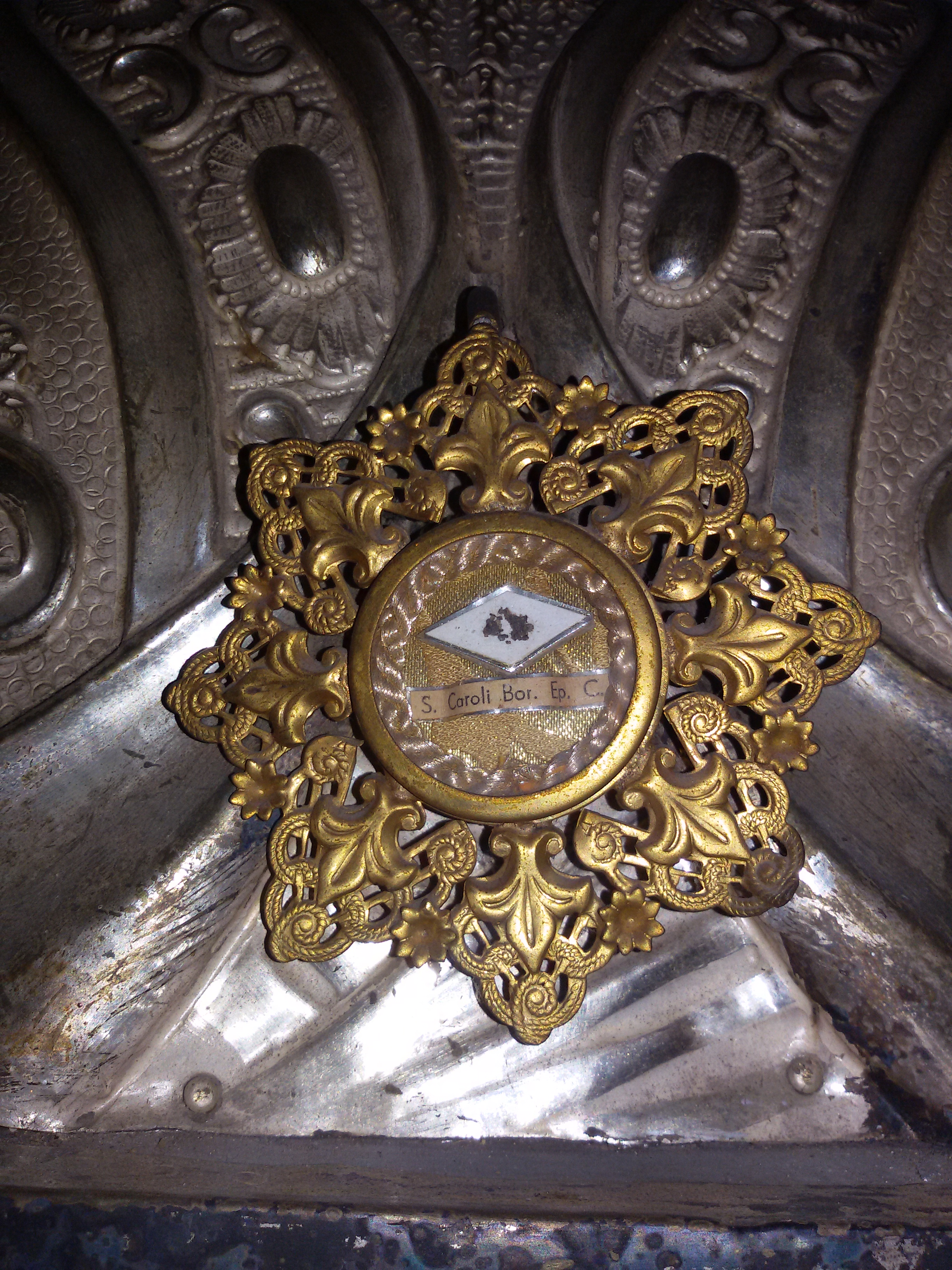 Santa Cristina Vergine e Martire del Tiverone